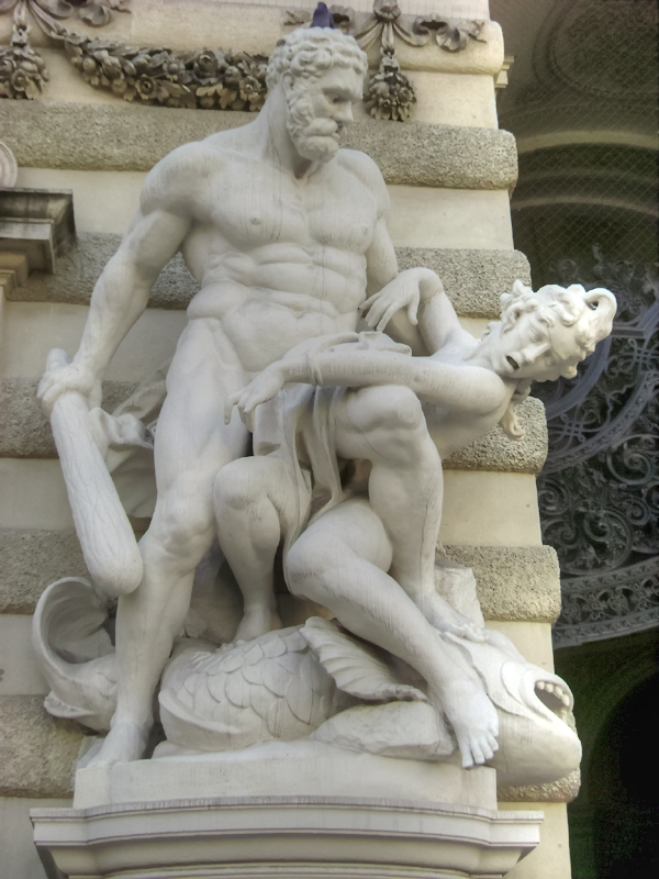 Der Michaelertrakt (Teil der Hofburg) in Wien.